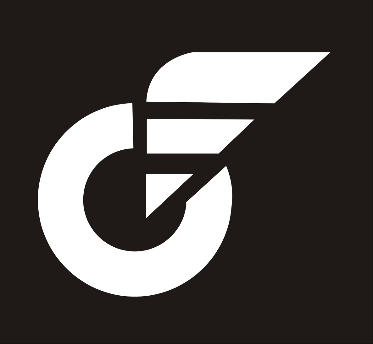 Tablica rozpoznawcza pojazdów Wojska Polskiego w Wielkiej Brytanii, wprowadzona od grudnia 1940